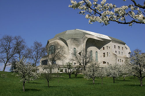 Goetheanum in Dornach